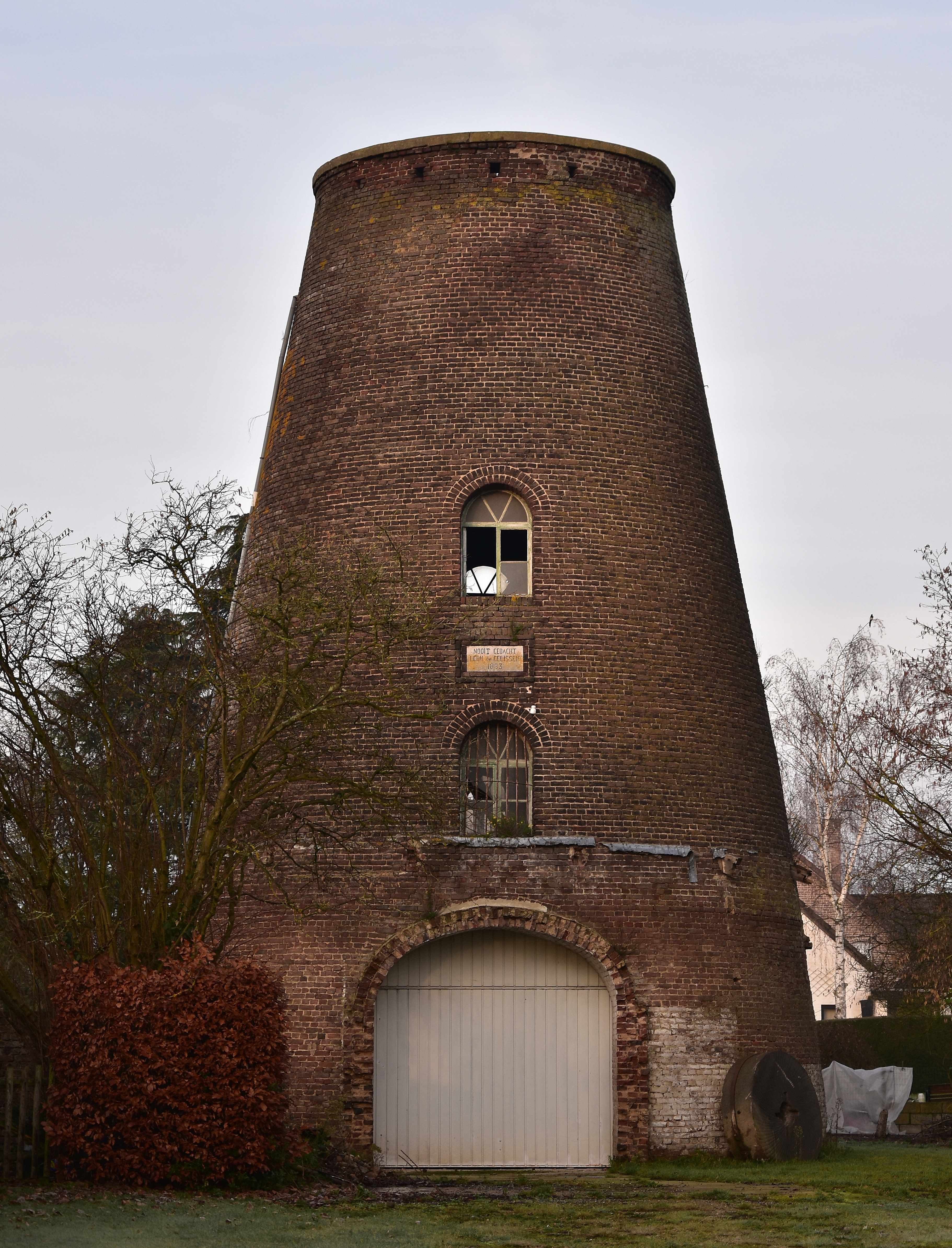 Kruiskensmolen (1102) Mechelen-aan-de-Maas 28-12-2019